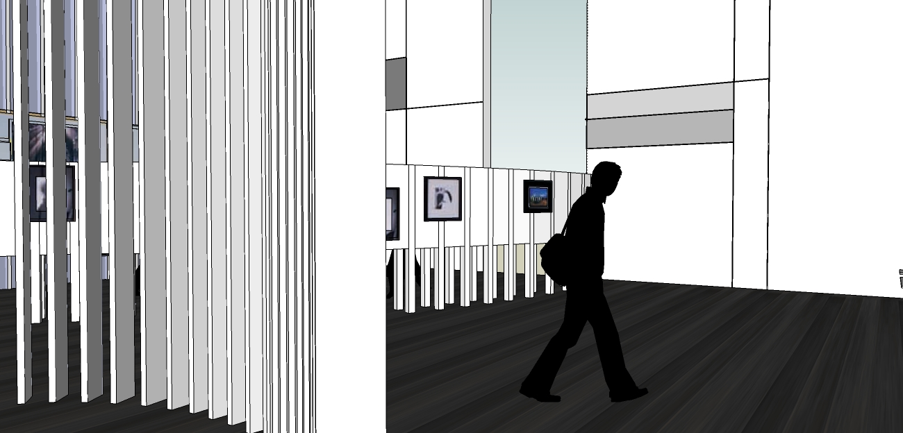 Template:Screenshotcopyrighted